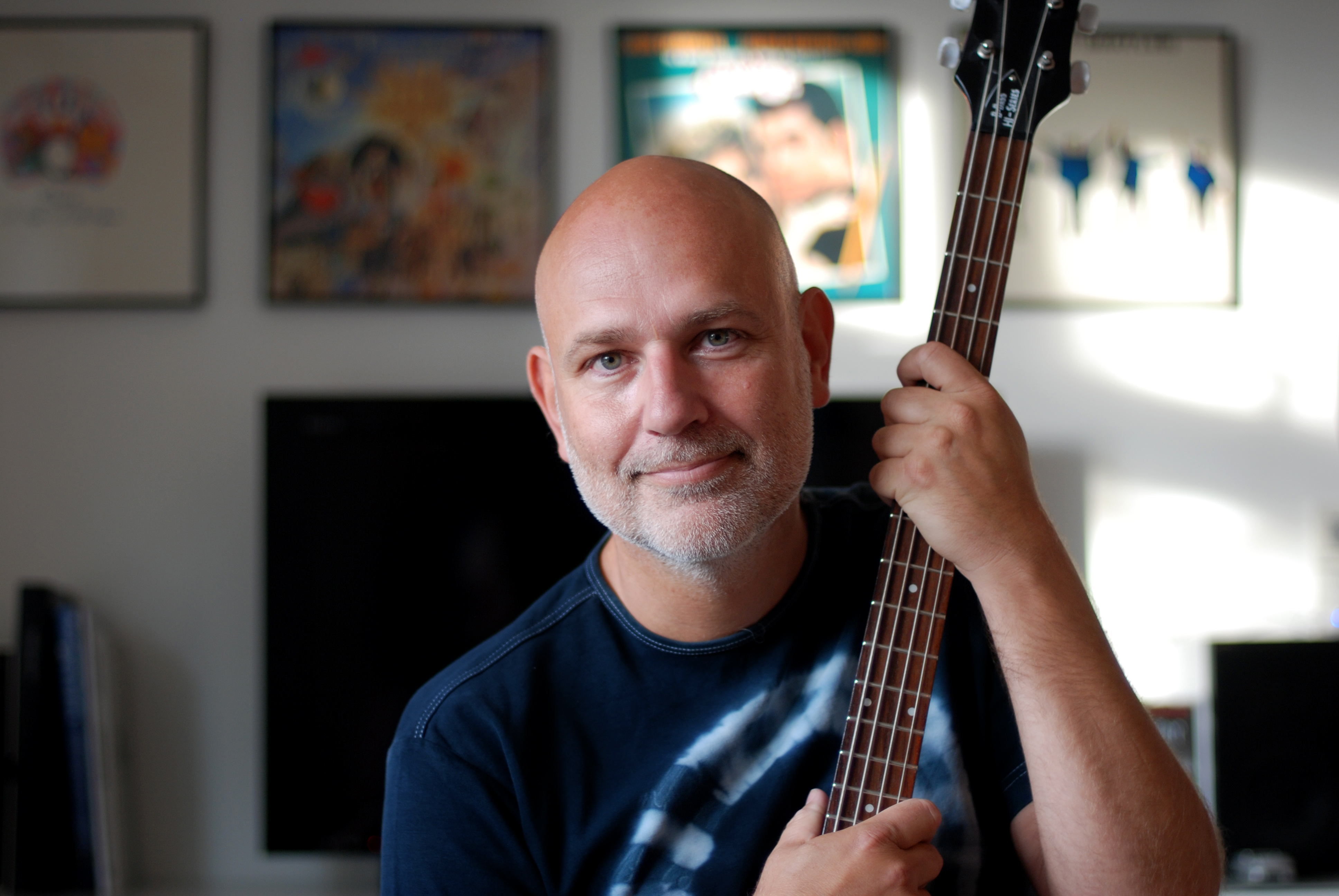 Morten K med sin elskede Höfner bas.